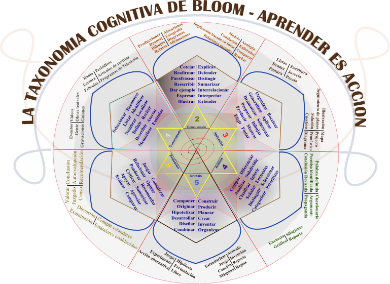 La Rosa de Bloom es realmente un trabajo de arte. Yo siempre quise tener (para mí y mis alumnos) más al alcance de las manos la mayoría de los verbos de acción que se usan en el aprendizaje. Mi idea es que profesionalmente uno nunca deja de aprender y en la práctica profesional necesariamente utilizamos esto verbos. La Vida es ¡acción! (Como lo dijo el Dr. Albert Ellis al que tuve el gusto de conocer personalmente en Nueva York) Entonces, este diagram-arte está basado en muchos otros diagramas, que a su vez están basados en la taxonomía cognitiva del aprendizaje de Bloom, la más aceptada en los Estados Unidos. En realidad, Bloom desarrolló dos taxonomías más, pero parece ser que no han sido muy bien aceptadas puesto que no son muy conocidas. Espero, y tengo la esperanza, que el lector gozará sus acciones más al estar conciente cuando usa estos verbos cada vez que aprende. ◙ JMK/NYC/2008 ◙